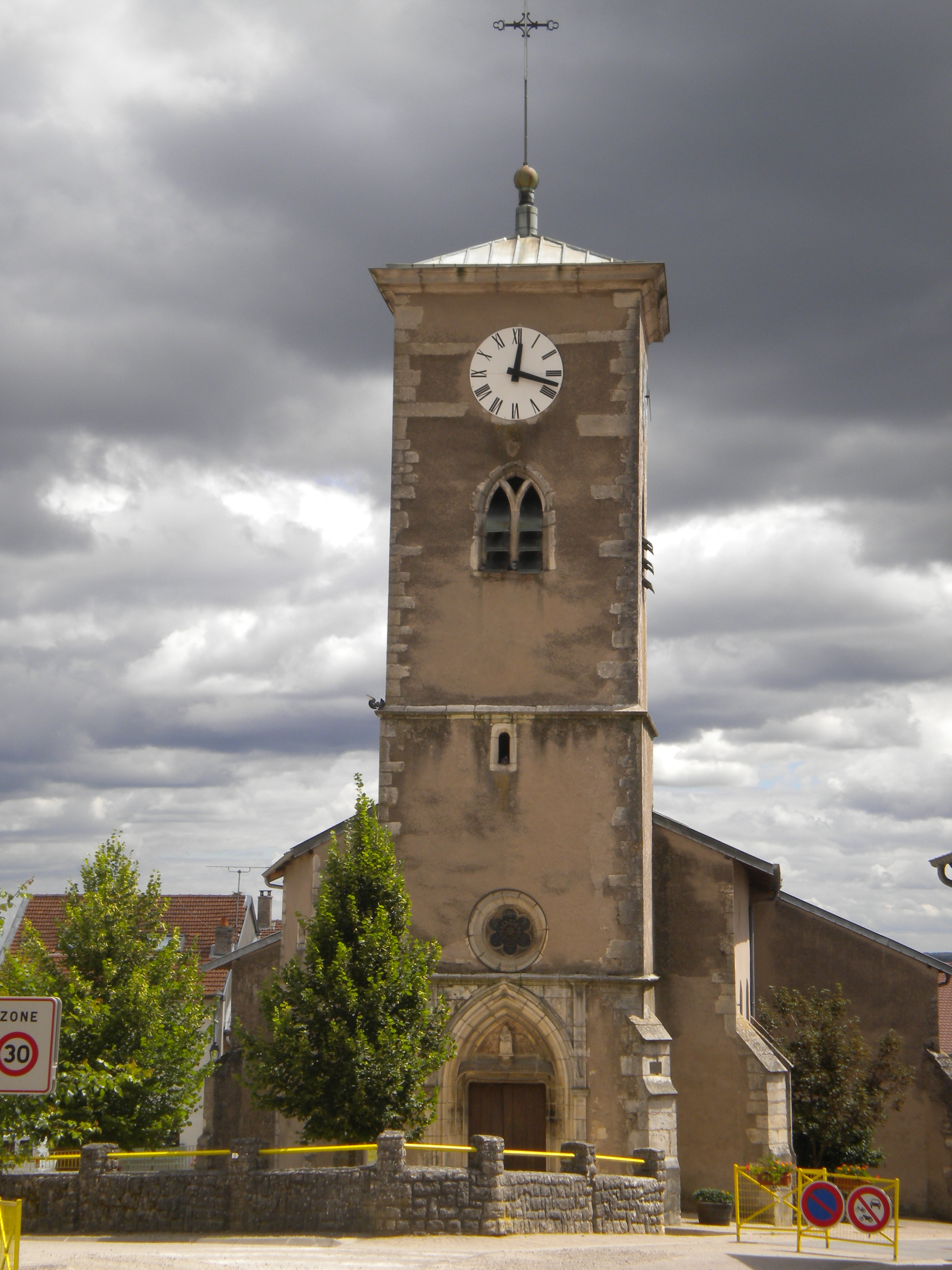 photo du clocher de l'église de Bulligny (XVe s)